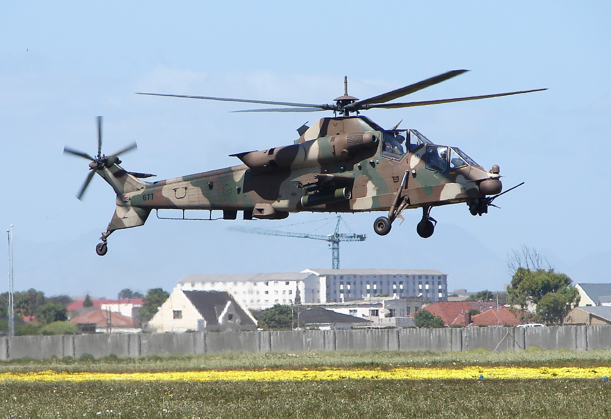 Rooivalk no. 677 at AAD 2010, AFB Ysterplaat